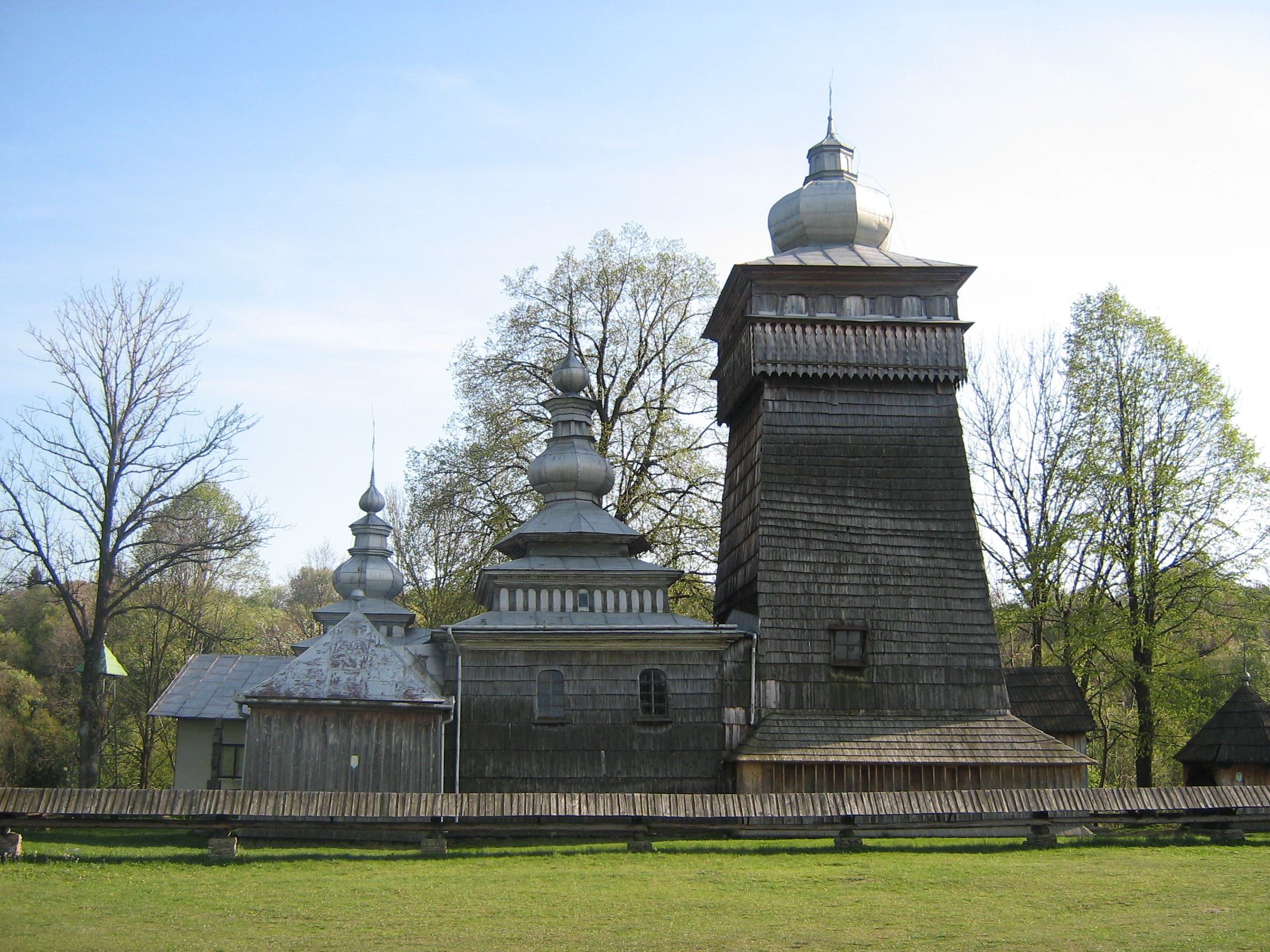 Cerkiew w Świątkowej Wielkiej (obecnie filialny kościół rzymskokatolicki)